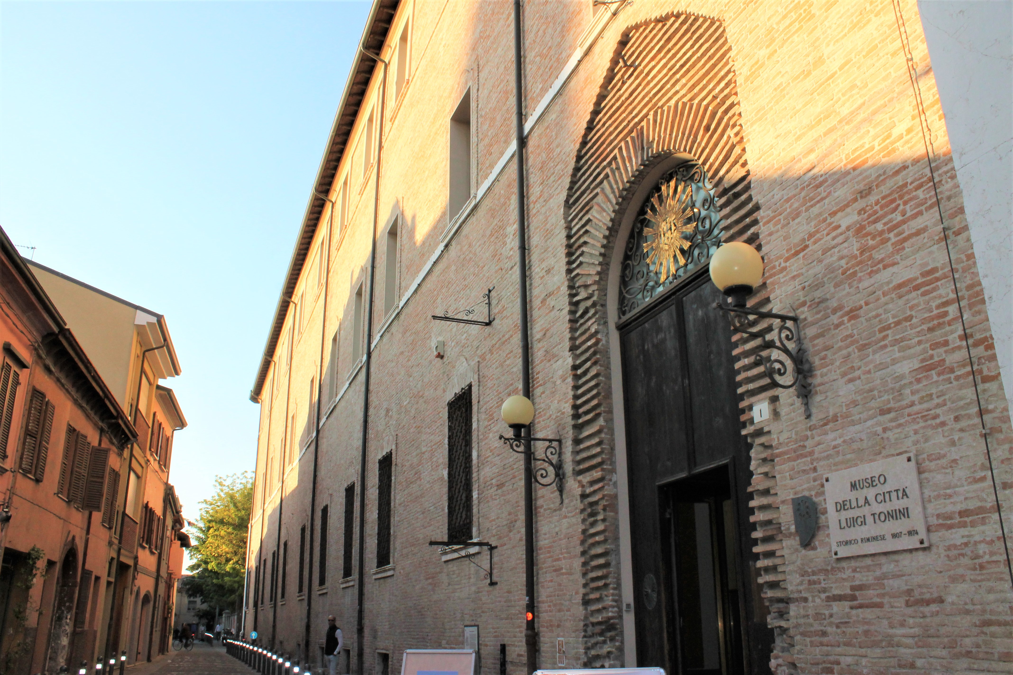 Museo della Città di Rimini in Piazza Ferrari This is a photo of a monument which is part of cultural heritage of Italy.